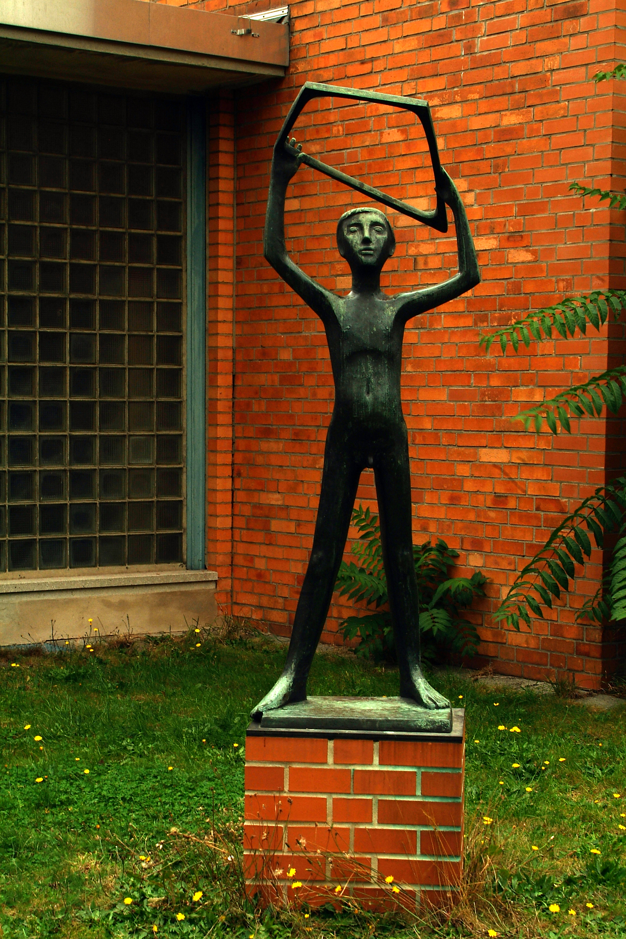 Die Skulptur "Junge mit Drachen" von Ingeborg Steinohrt|Ingeborg Steinohrt von 1959 wurde ursprünglich vor der "Volksschule Meldaustraße" aufgestellt. Heute schmückt die Figur die Eingangsfront der Goetheschule - Aussenstelle An Mußmanns Haube" in Hannover - Herrenhausen (Ansicht von vorn).